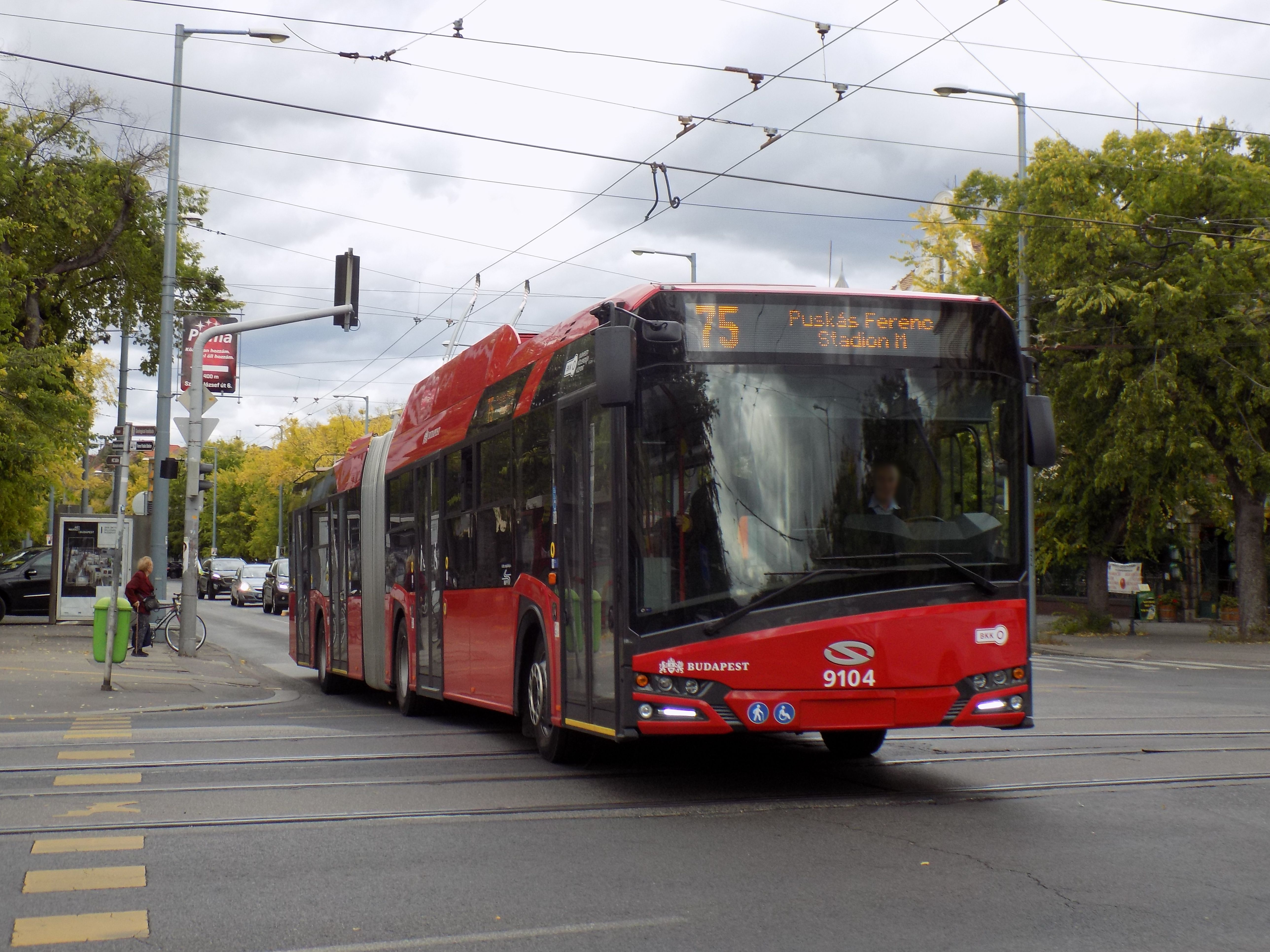 75-ös jelzésű 4. generációs Solaris Trollino 18 trolibusz a Stefánia út és a Thököly út kereszteződésében (psz. 9104)